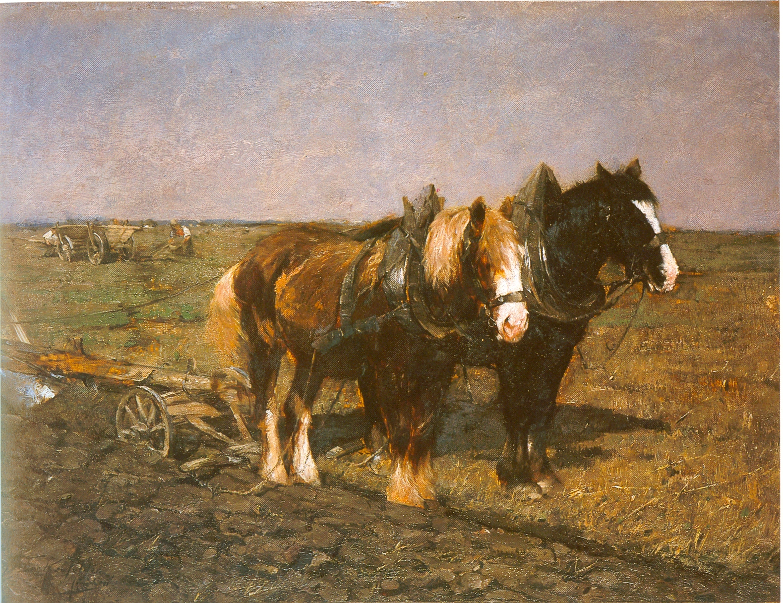 Zwei ferde vor dem Pflug stehend Öl/Holz 27,3*35,9 cm Privat